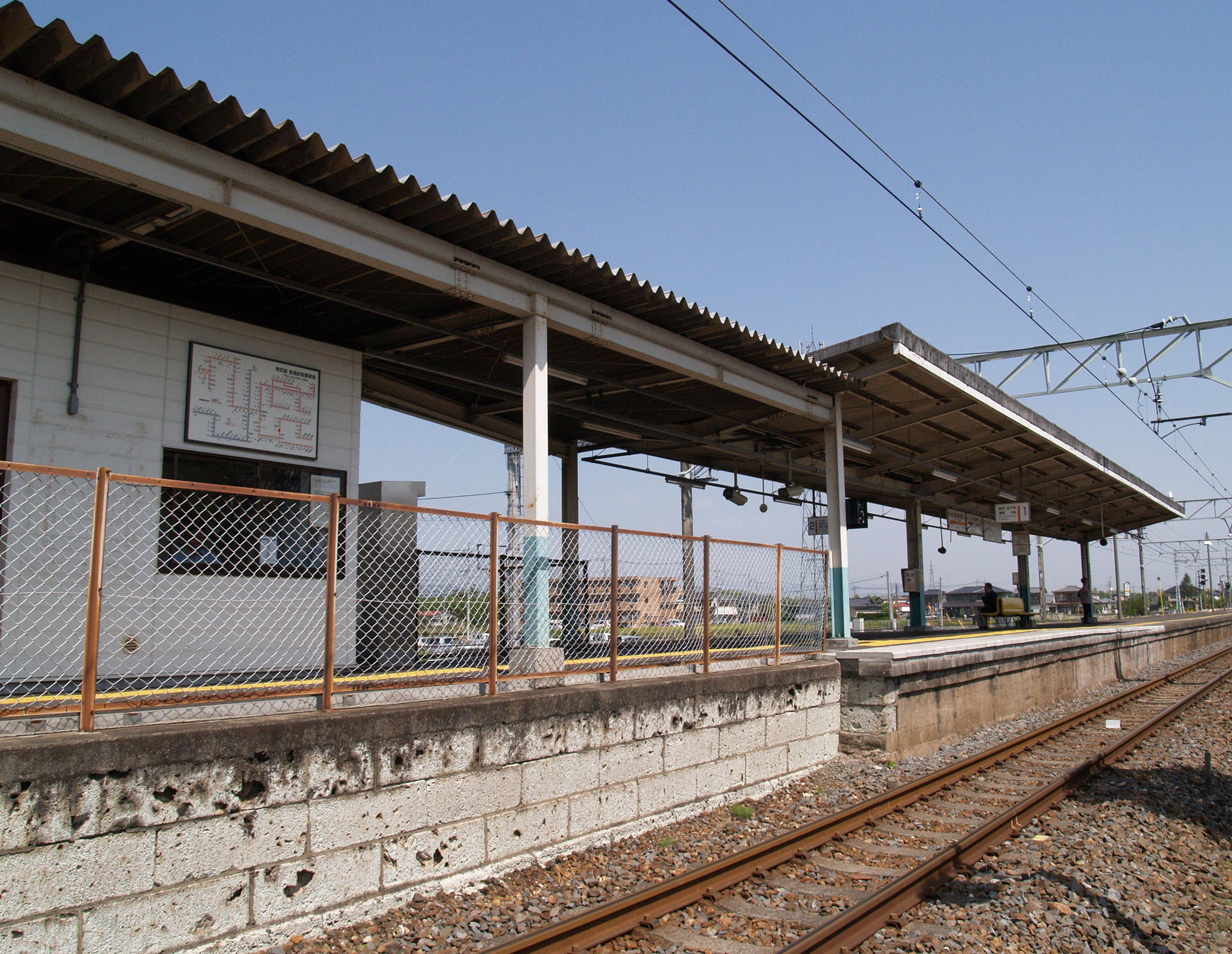 家中駅ホーム